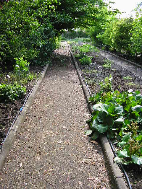 Photo d'une allée de la collection systématique du jardin botanique de la Charme à Clermont-Ferrand, Auvergne, France